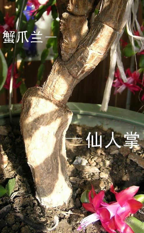 蟹爪兰 smartneddy 2004年12月摄